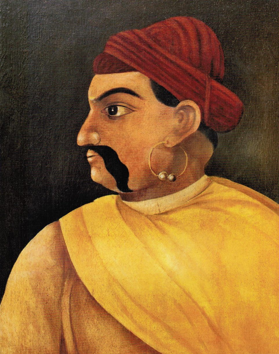 Tukoji Rao Holkar, Maharaja of Indore